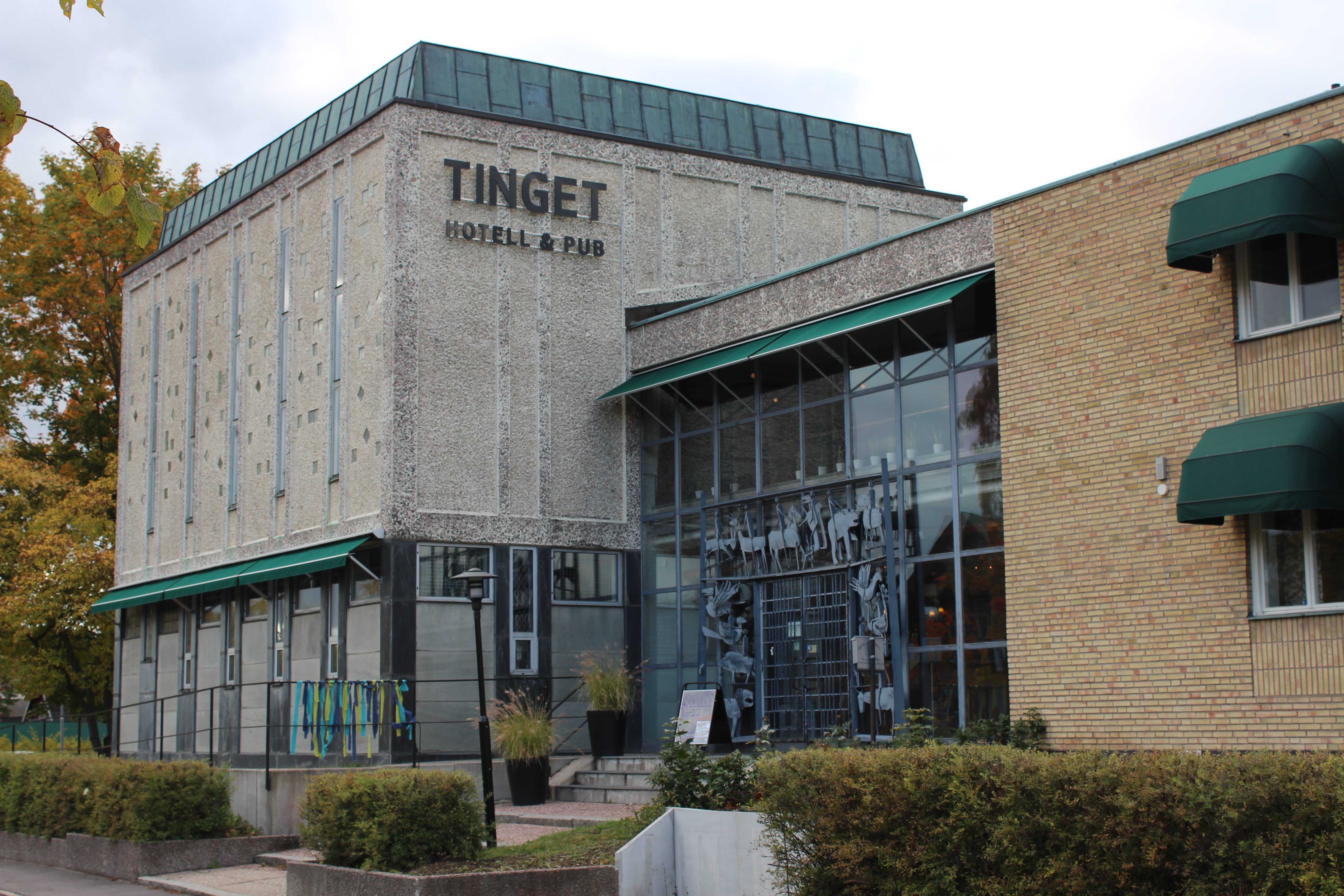 SALA TINGSRÄTT